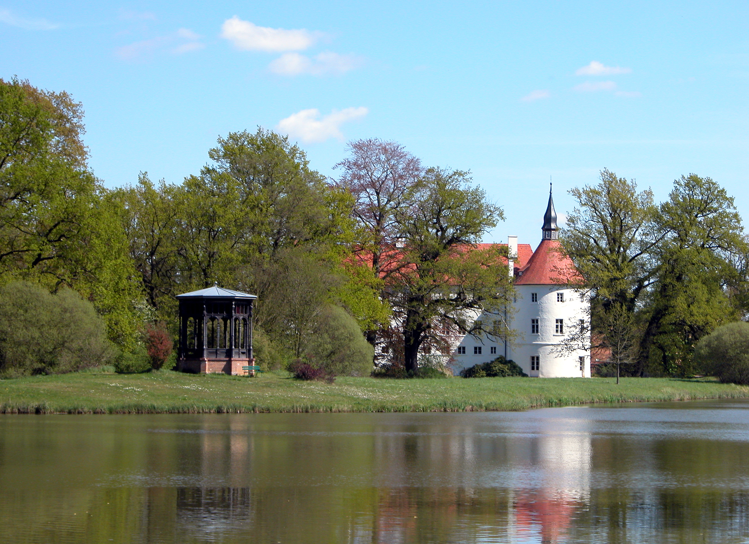 29.04.2015 15926 Fürstlich Drehna (zu Luckau): Schloßpark. Sichten von SW aus dem Park zum Schloß. Nach Plänen des Cottbuser Landschaftsarchitekten Helmut Rippl entstand nach 1990 der Schloßteich auf Braunkohlenkippengelände neu. (DSCN5088.JPG]20150429360DR.JPG(c)Blobelt